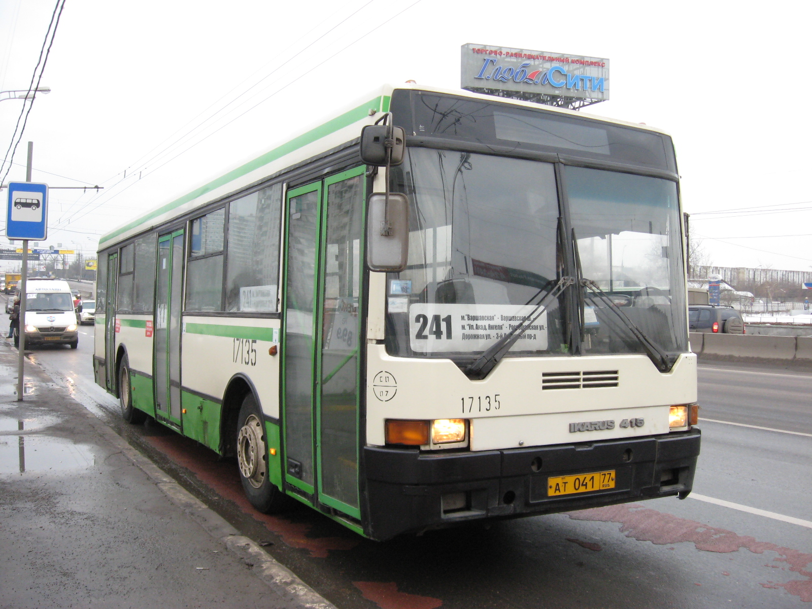 Ikarus-415.33 № 17135, Варшавское ш.